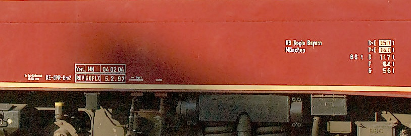 Anschriftenfeld der DB-Baureihe E10 (113 311)